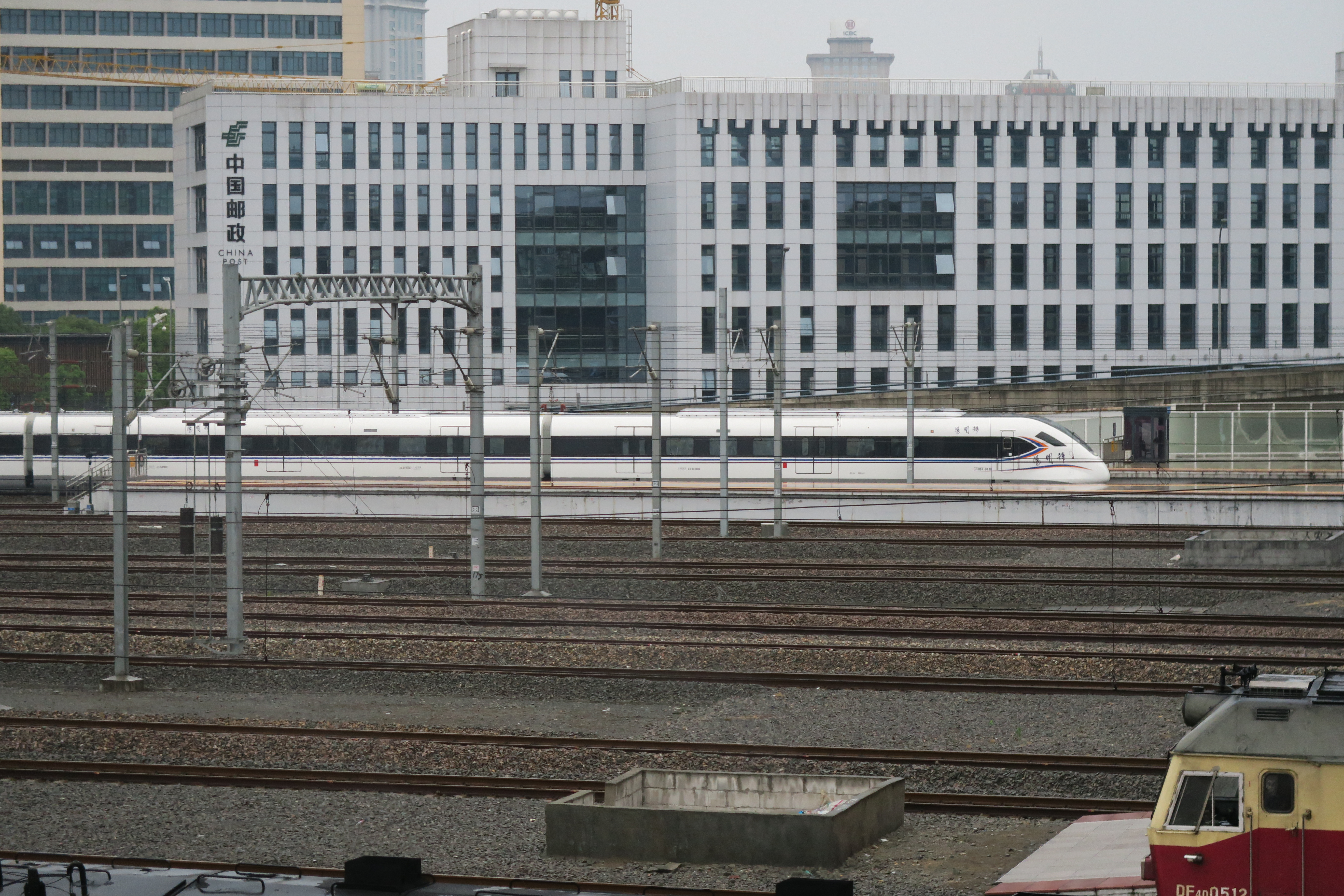 CRH6F-0418 担当 S1207 次驶入宁波站